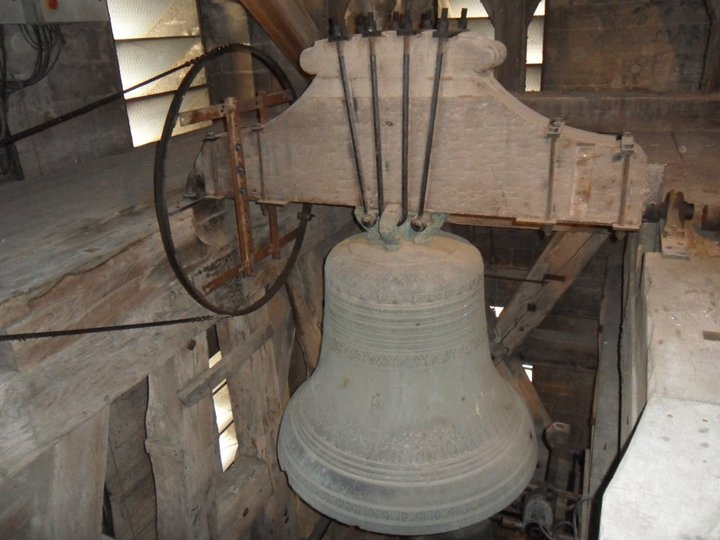 Une cloche du carillon de la cathédrale Notre-Dame des Doms d'Avignon